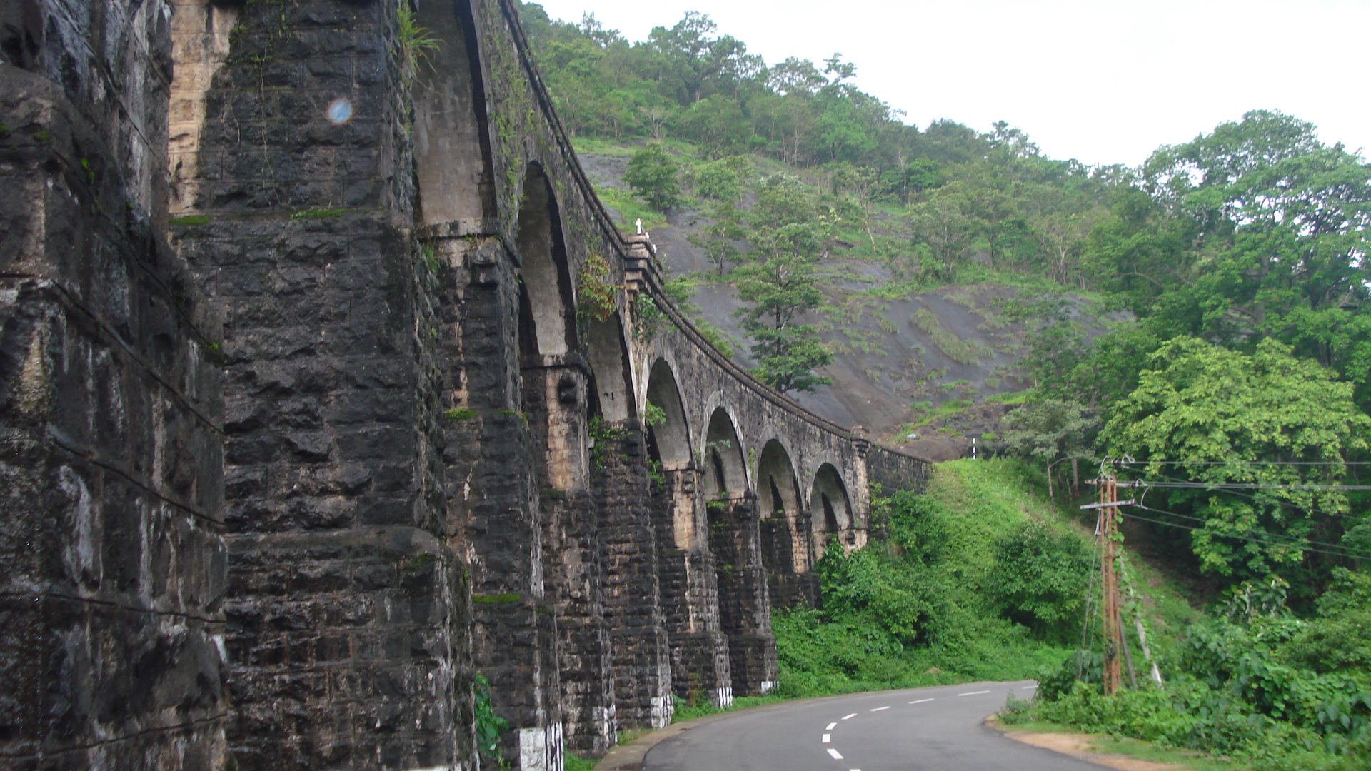 പതിമൂന്ന് കണ്ണറപ്പാലം